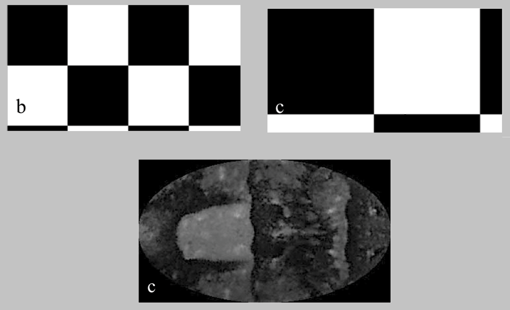 Fig. 3. Imágenes de ejemplo utilizadas para la categorización de camuflaje de imágenes segmentadas de jibia.